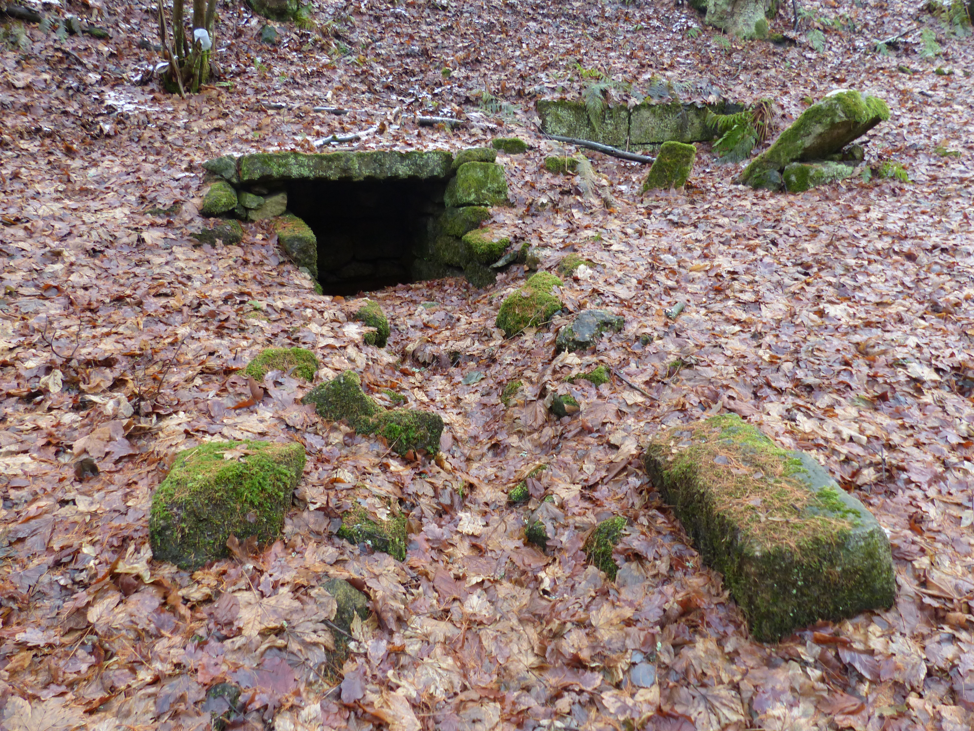 Wüstung Ottengrün bei Haslau, Brunnen im Tal